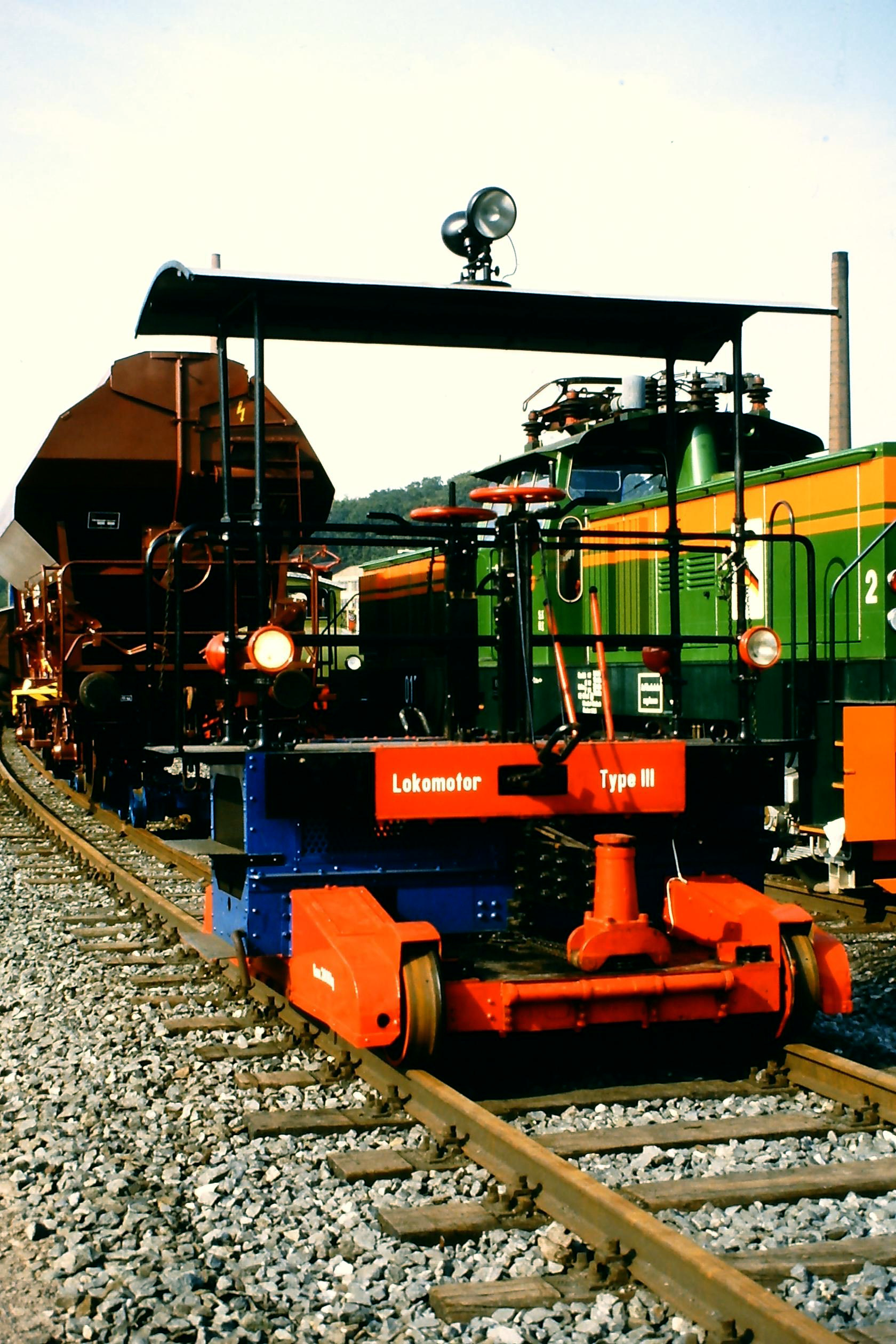 Lokomotor Typ III, ausgestellt auf der Fahrzeugschau 150 Jahre deutsche Eisenbahn in Bochum-Dahlhausen